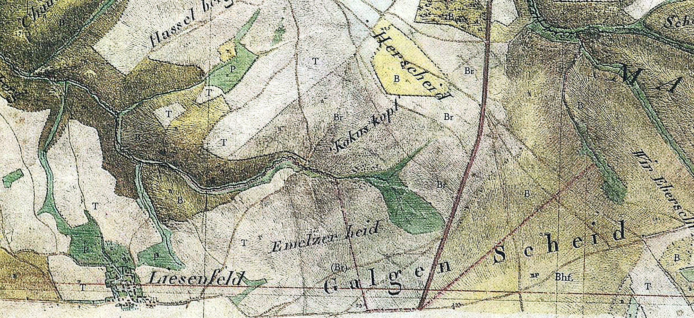 Vemutl. erste geometrische Darstellung des Richtstätten-Geländes Gallscheider Gerichtauf dem Vorderhunsrück